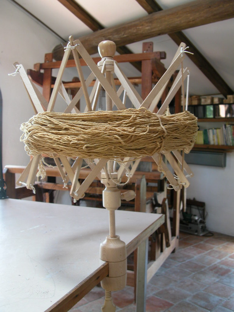 foto mia personale, 2007